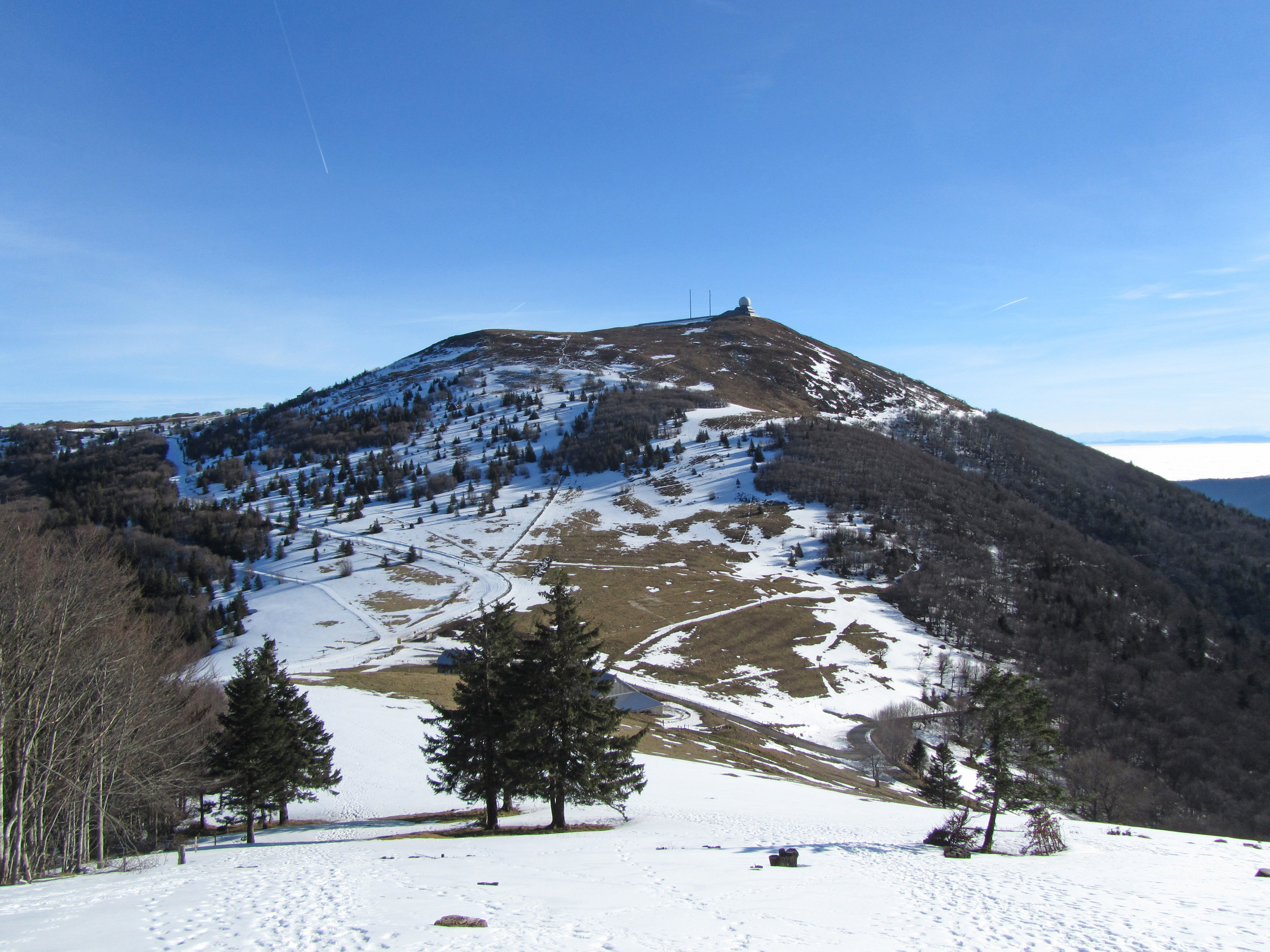 Der Grand Ballon (1424) in den Vogesen von Westen